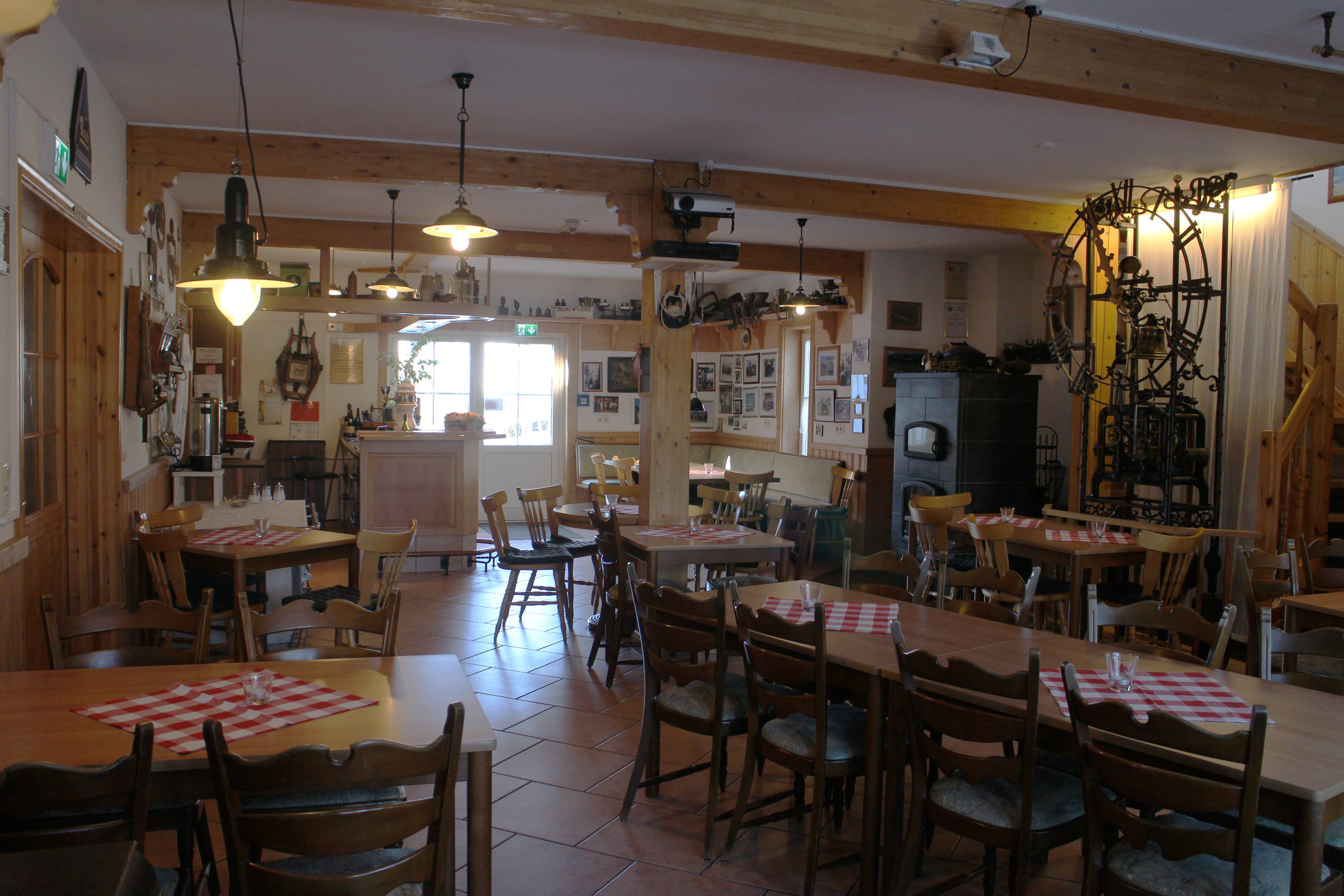 Das Bild zeigt das Cafe im Technikmuseum Freudenberg